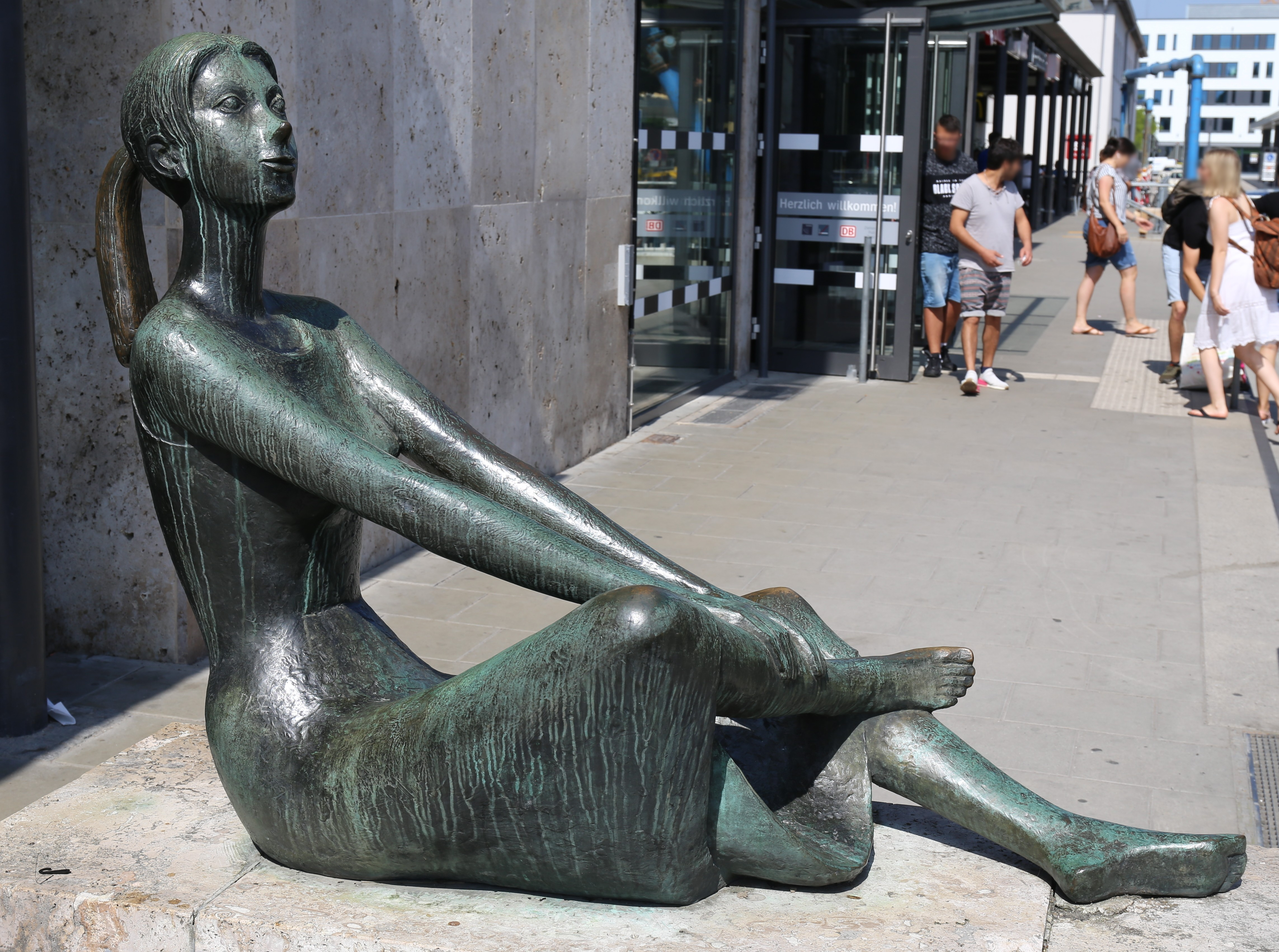 Marianne Lüdicke, Sitzendes Mädchen, Bronze; Bahnhof Rosenheim Marianne Lüdicke (1919–2012) DescriptionGerman sculptressDate of birth/death 18 October 1919 18 August 2012Location of birth/death Frankfurt am Main MarquartsteinAuthority control : Q54890 VIAF: 30331906 ISNI: 0000 0000 1368 502X GND: 11872956X RKD: 420749 creator QS:P170,Q54890